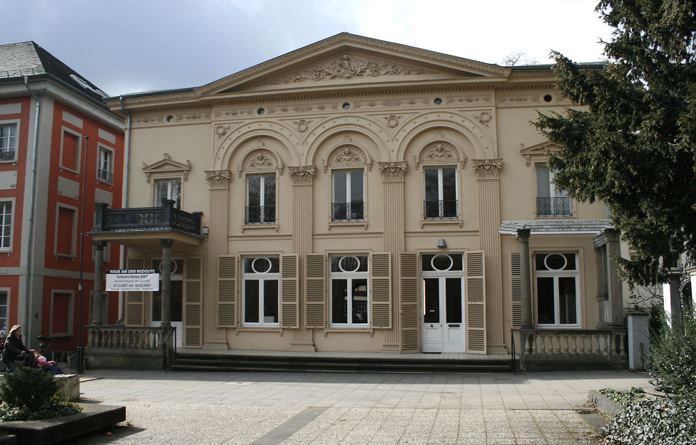 Das „Haus an der Redoute“ im Bonner Stadtbezirk Bad Godesberg, ehemals Hof- und Kammertheater